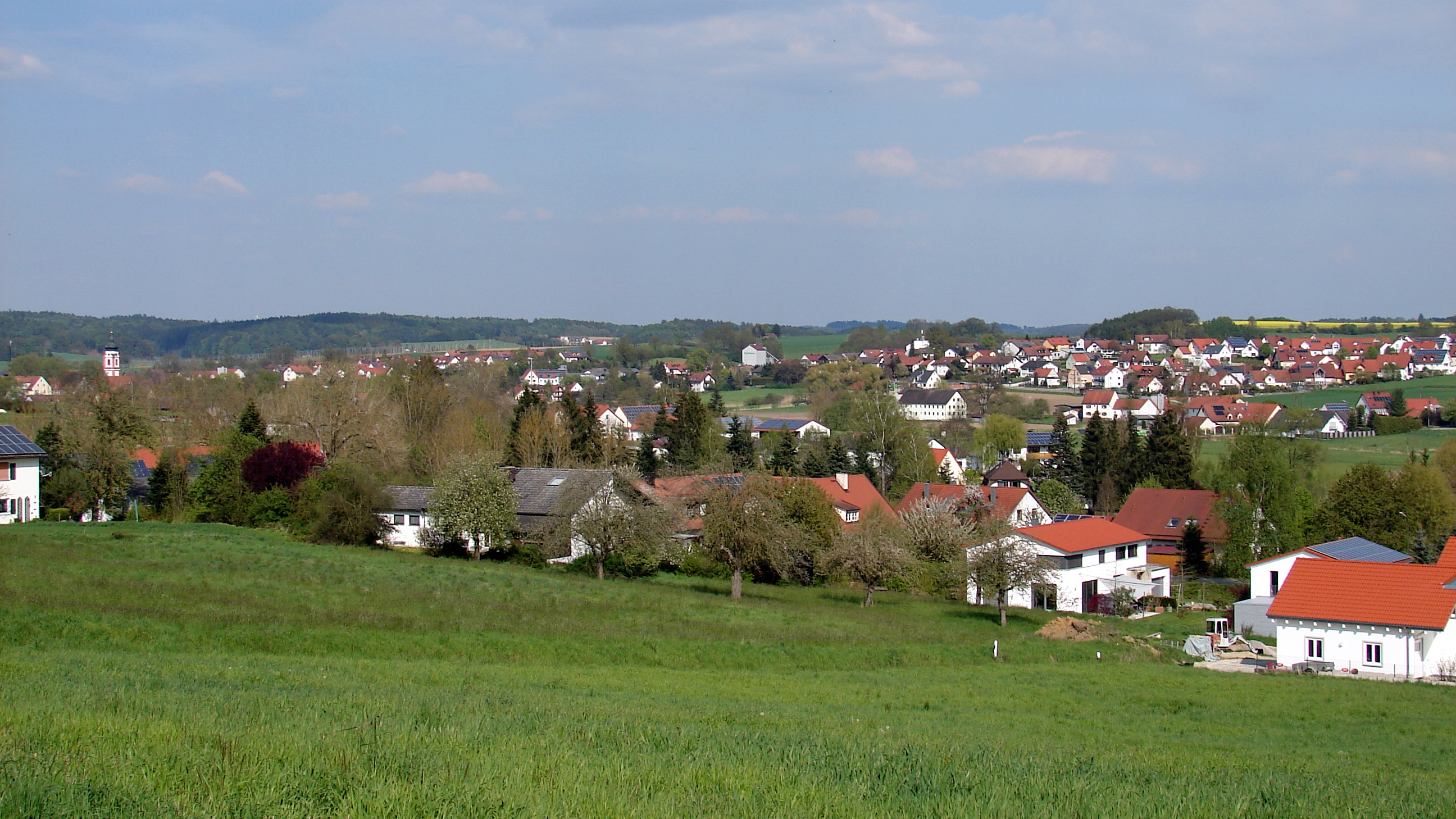 Rudelzhausen ist eine Gemeinde im nördlichen Landkreis Freising im Regierungsbezirk Oberbayern.